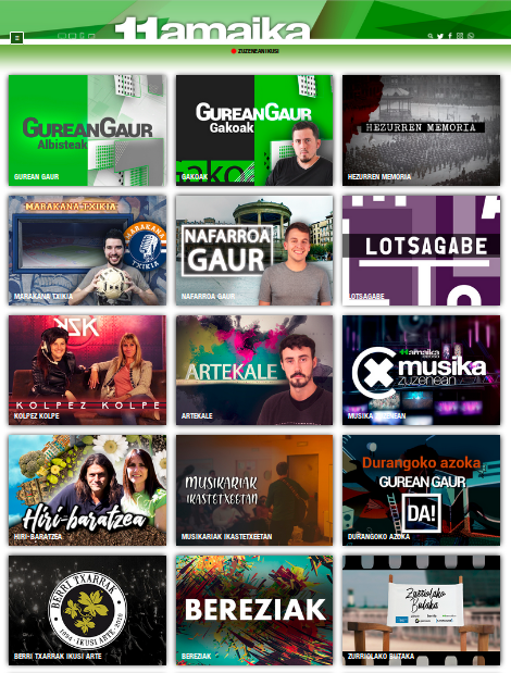 Hamaika Telebistako programak nahieran 2019an.